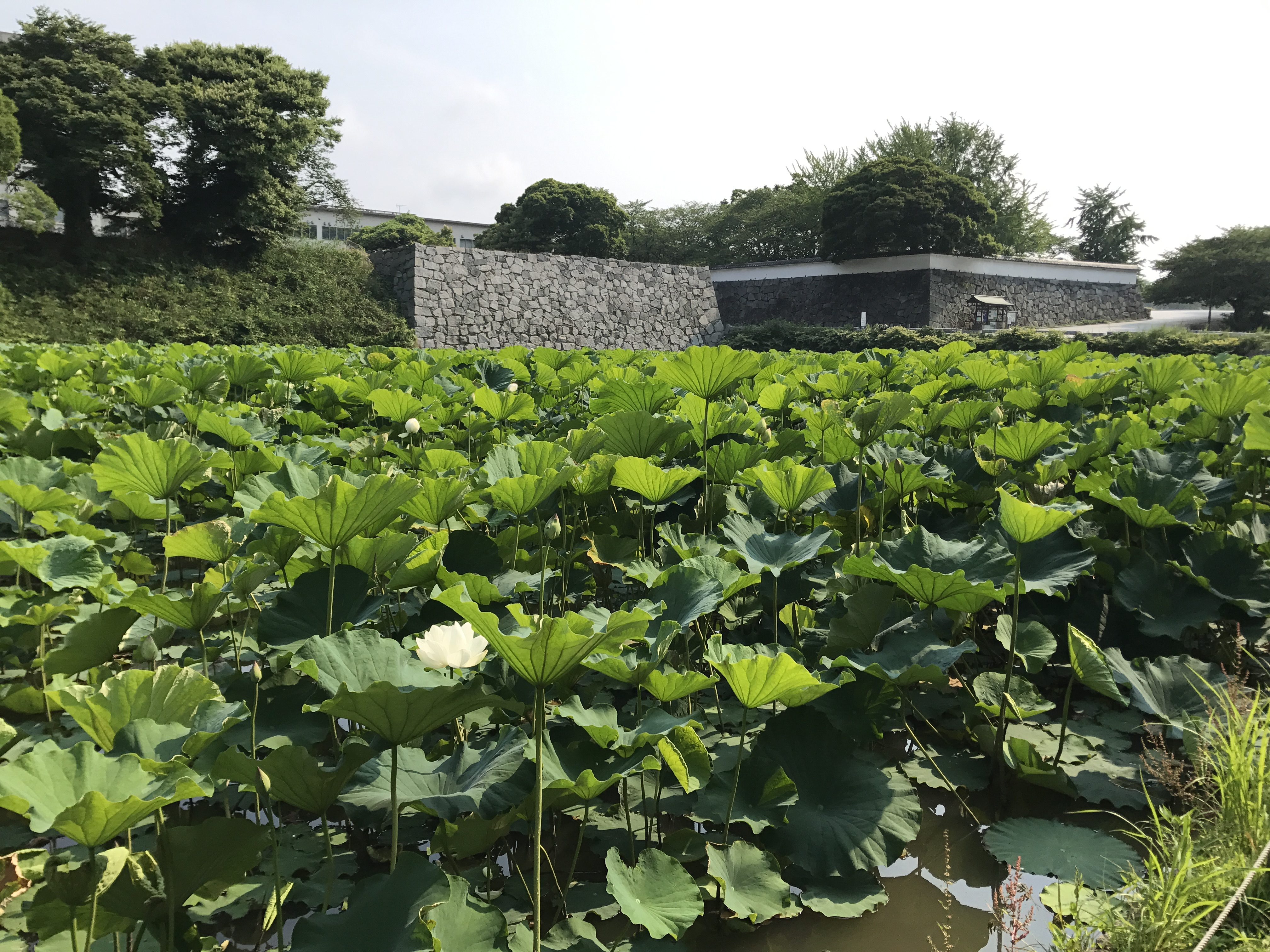 福岡城の上之橋御門とハス